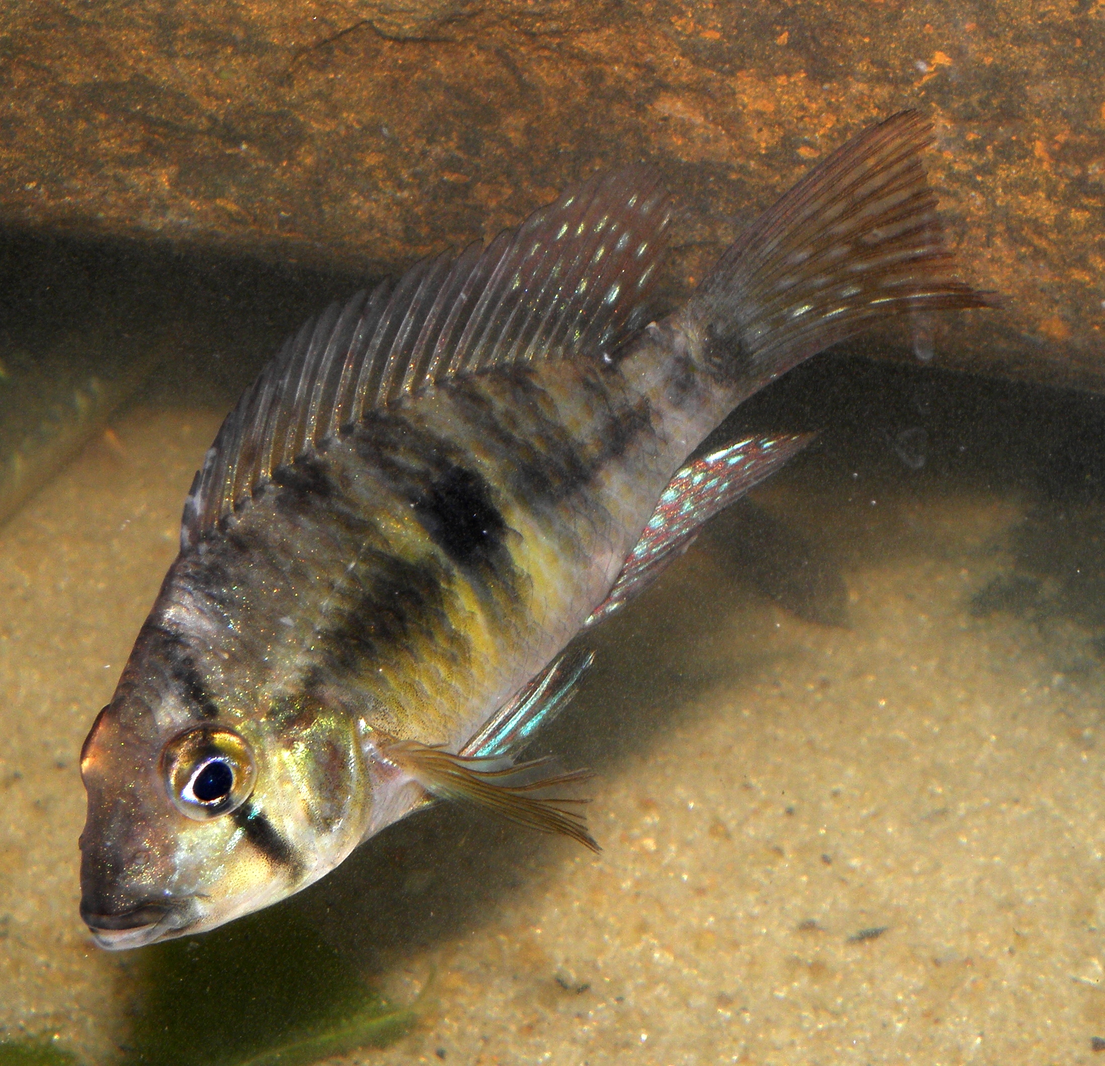 Gymnogeophagus meridionalis.